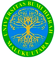 Logo Universitas Bumi Hijrah